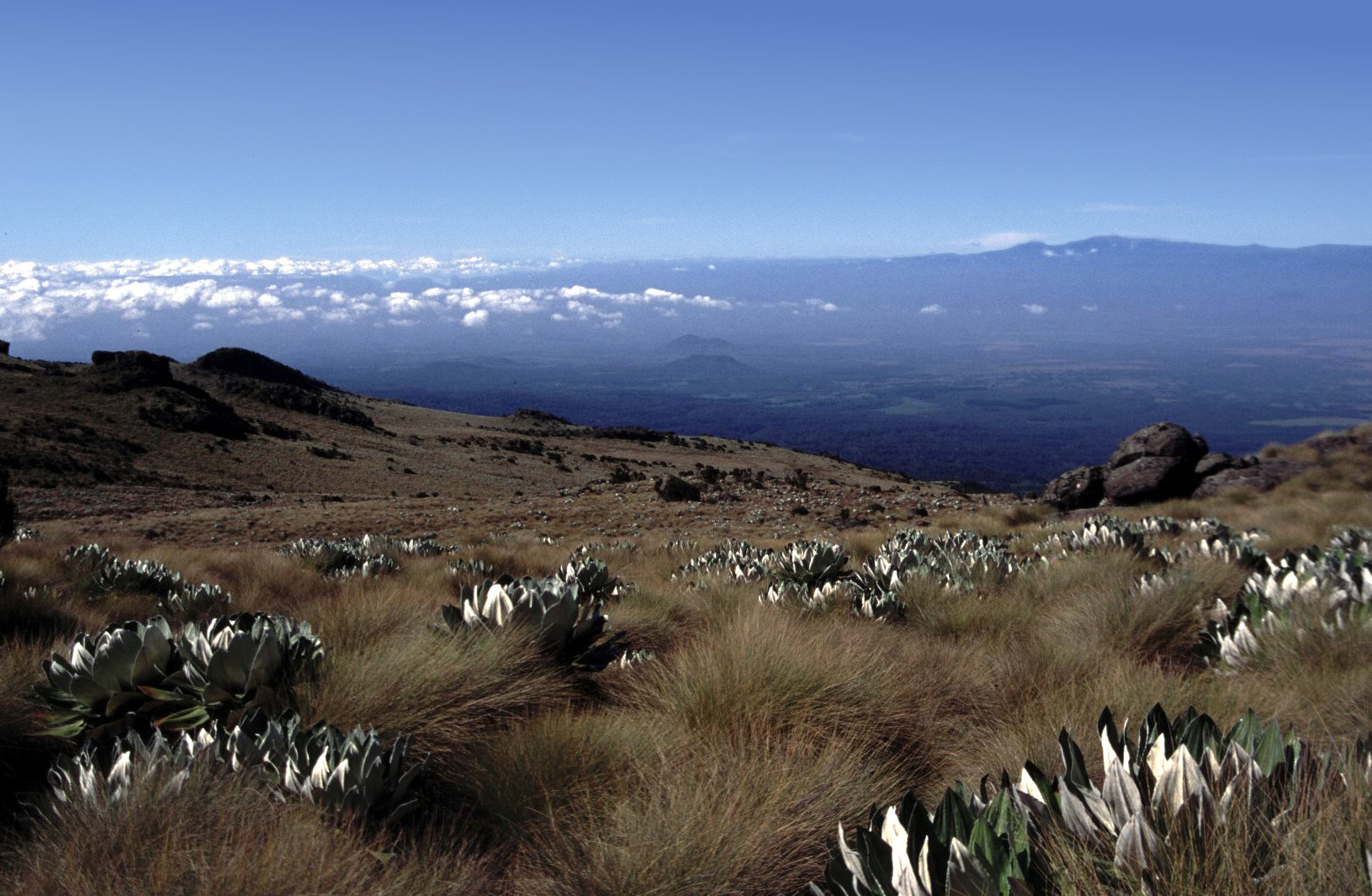 Senecio and lobelia on Mount KenyaMount Kenya